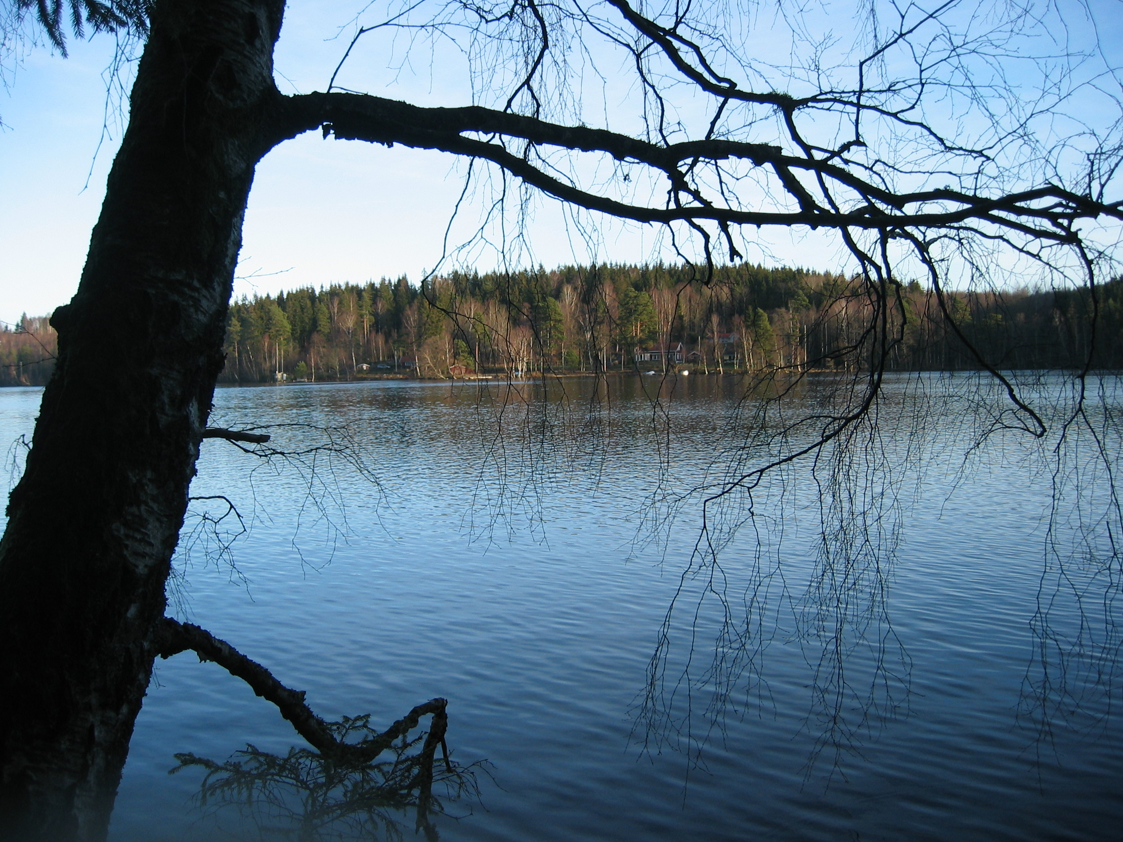 Lilla (Långa) Stamsjön